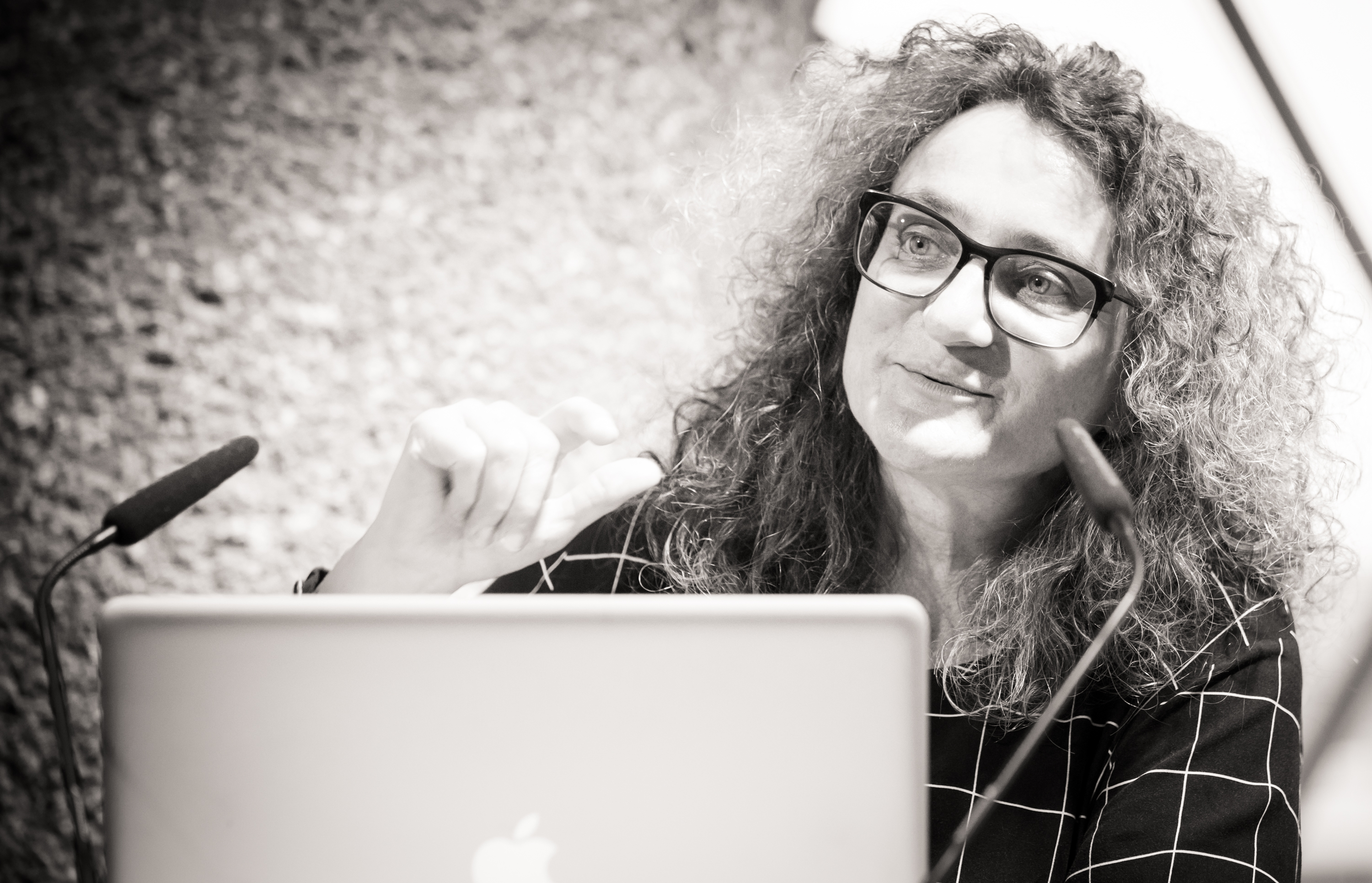 Yasemin Utku beim BDA Montagsgespräch „Ist das Baukultur oder kann das weg?“ im Domforum Köln.